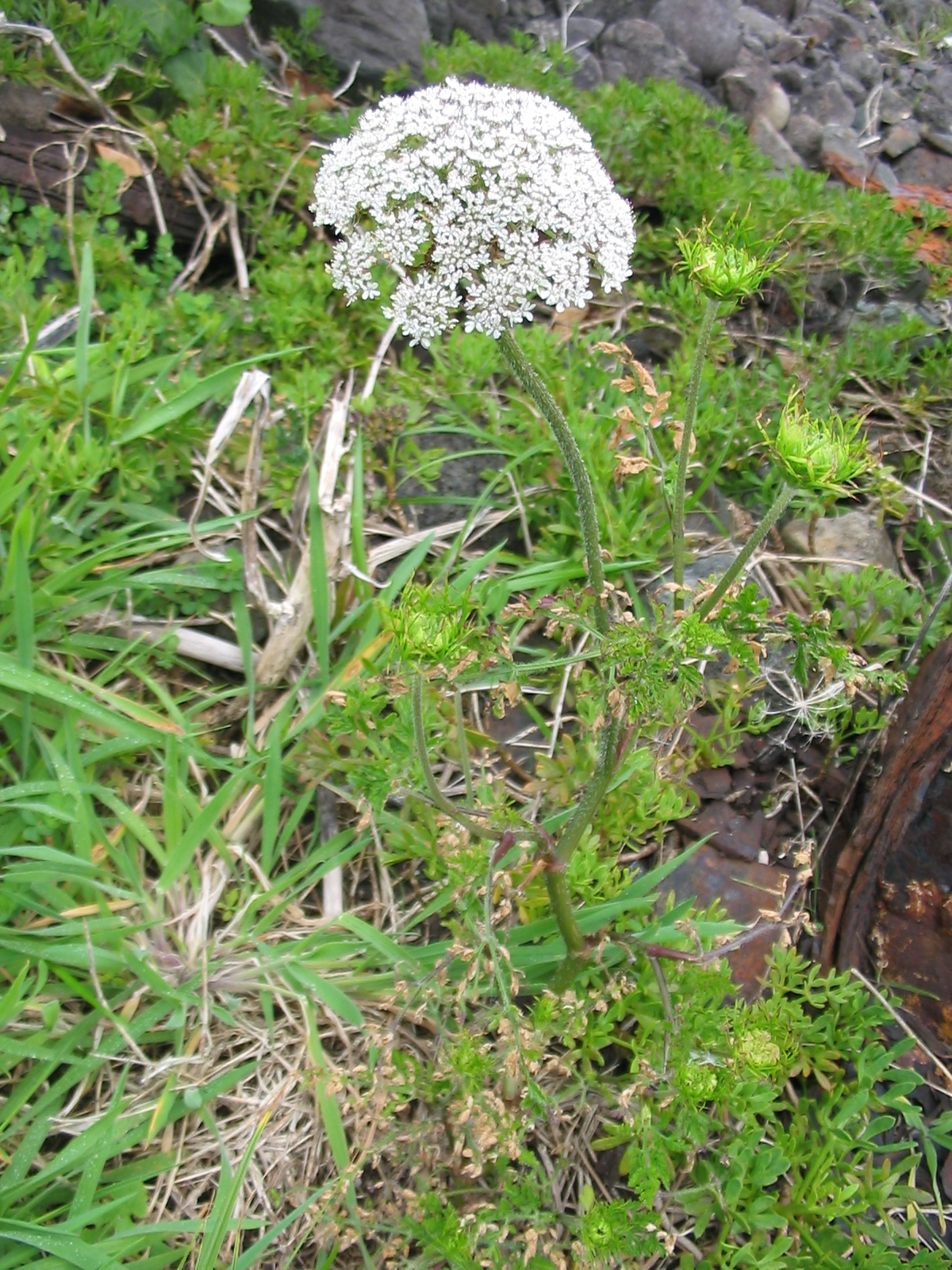 Wilde Möhre (Daucus carota ssp. azorica) - Habitus